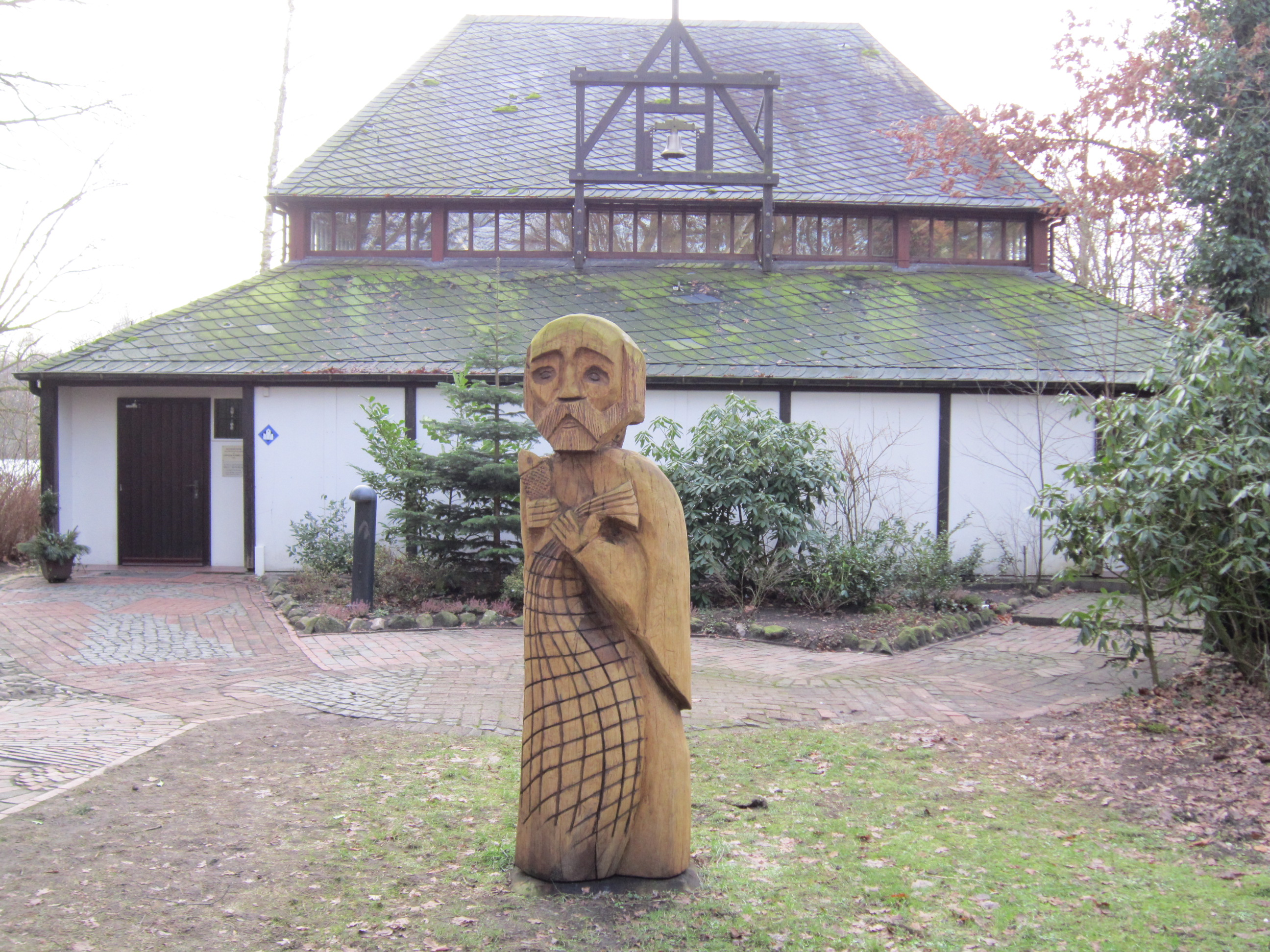 St. Petri-Kapelle beim Jugendheim Ahlhorn